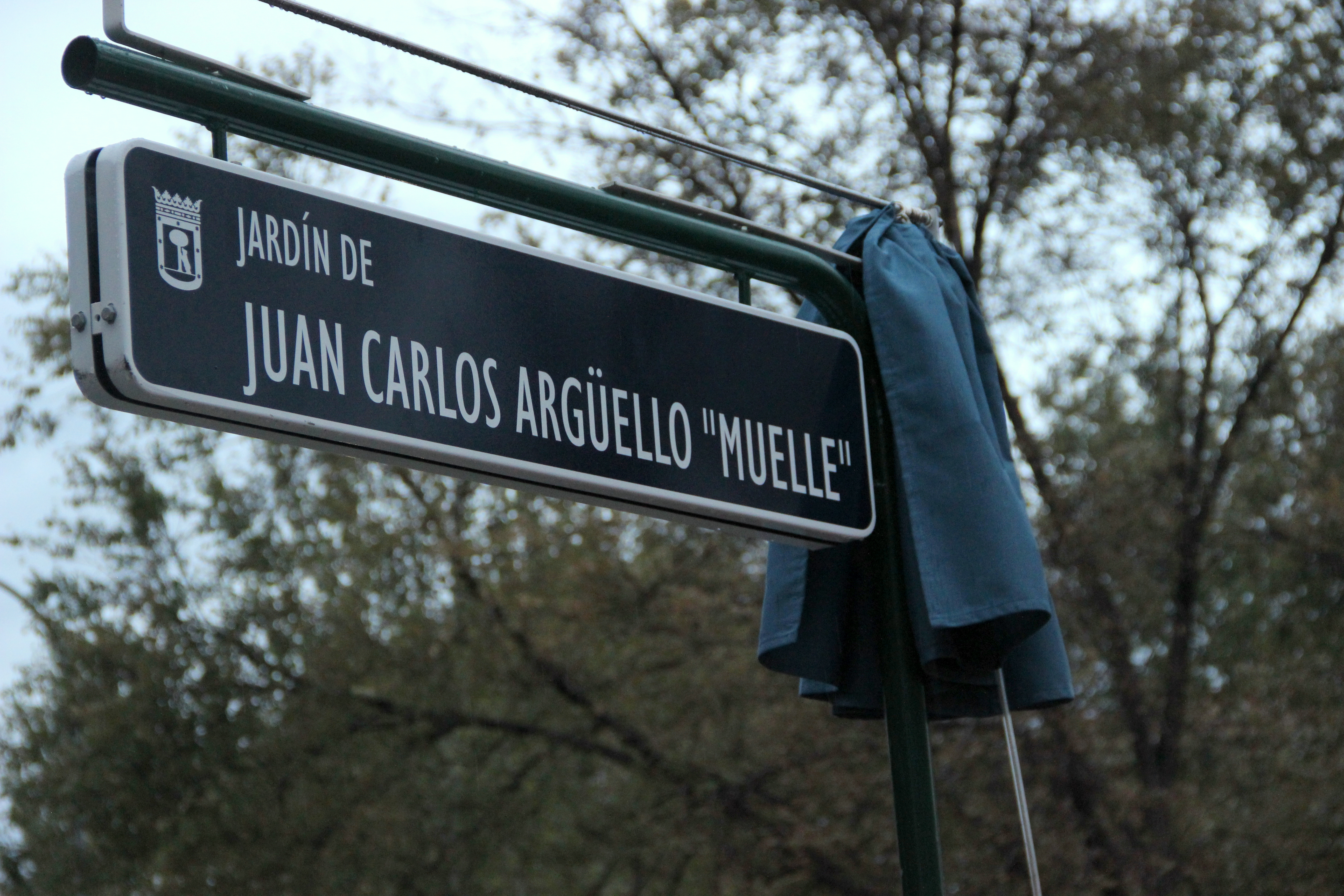 El 19 de octubre de 2016, la madre y el hermano de Juan Carlos Argüello 'Muelle' inauguraron un jardín con el nombre del grafitero, situado entre la calle Carabias y la A-5, junto a la que fue su casa, en Campamento.